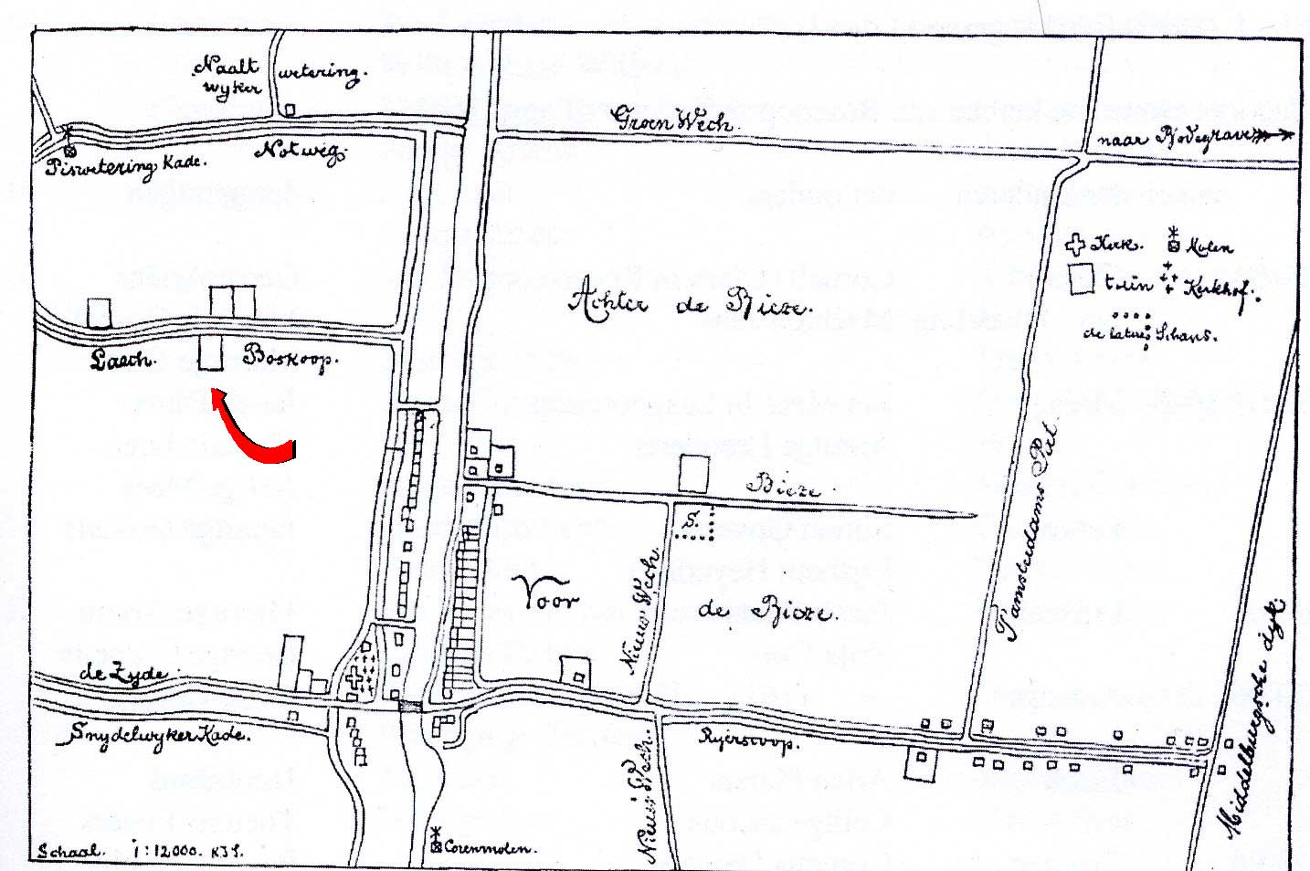 Plattegrond Boskoop (de locatie van Laag Boskoop door mij met rode pijl gemarkeerd)